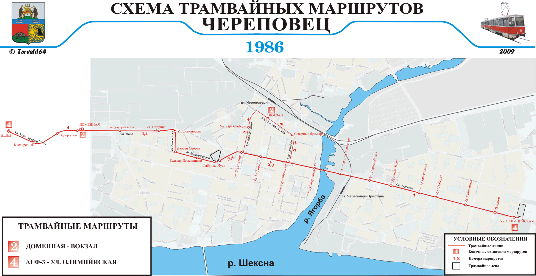 Схема трамвайных маршрутов Череповца 1986 г.